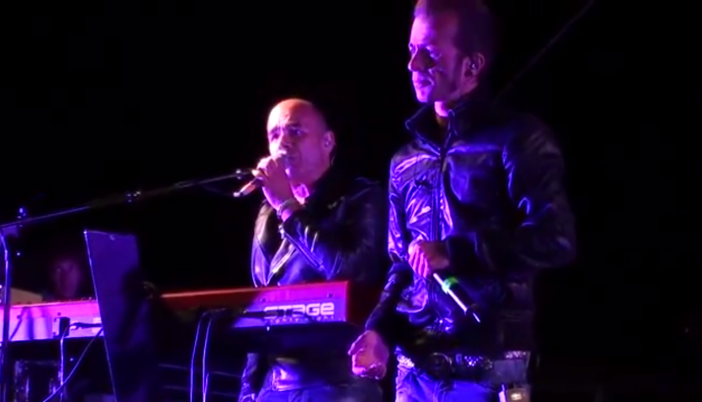 Il tastierista Gigi Camedda e il cantante Nicola Nite, del gruppo musicale sardo Tazenda, in concerto ad Arbus nell'agosto 2014